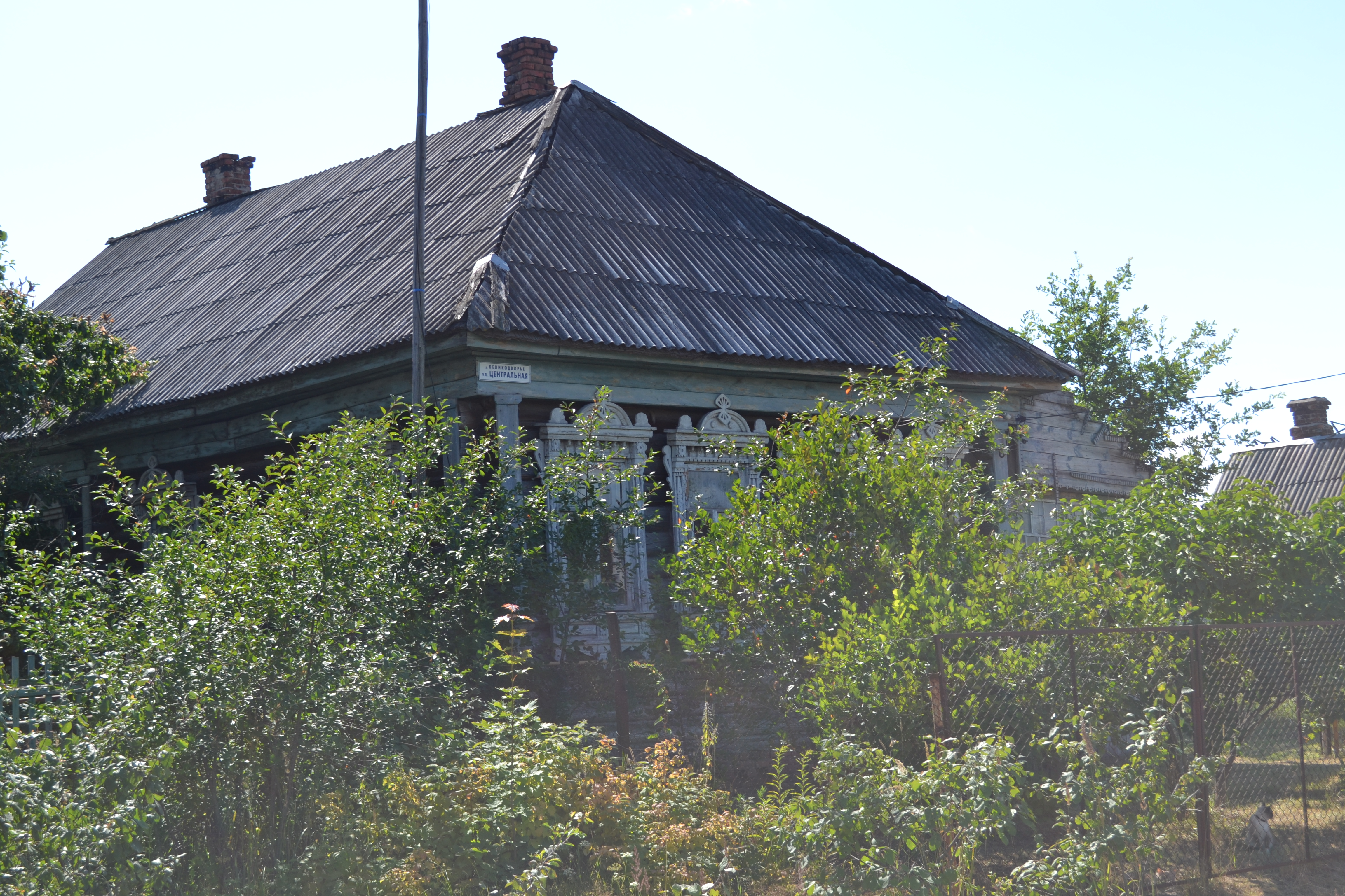 Дом в деревне Великодворье (Шатурский район)